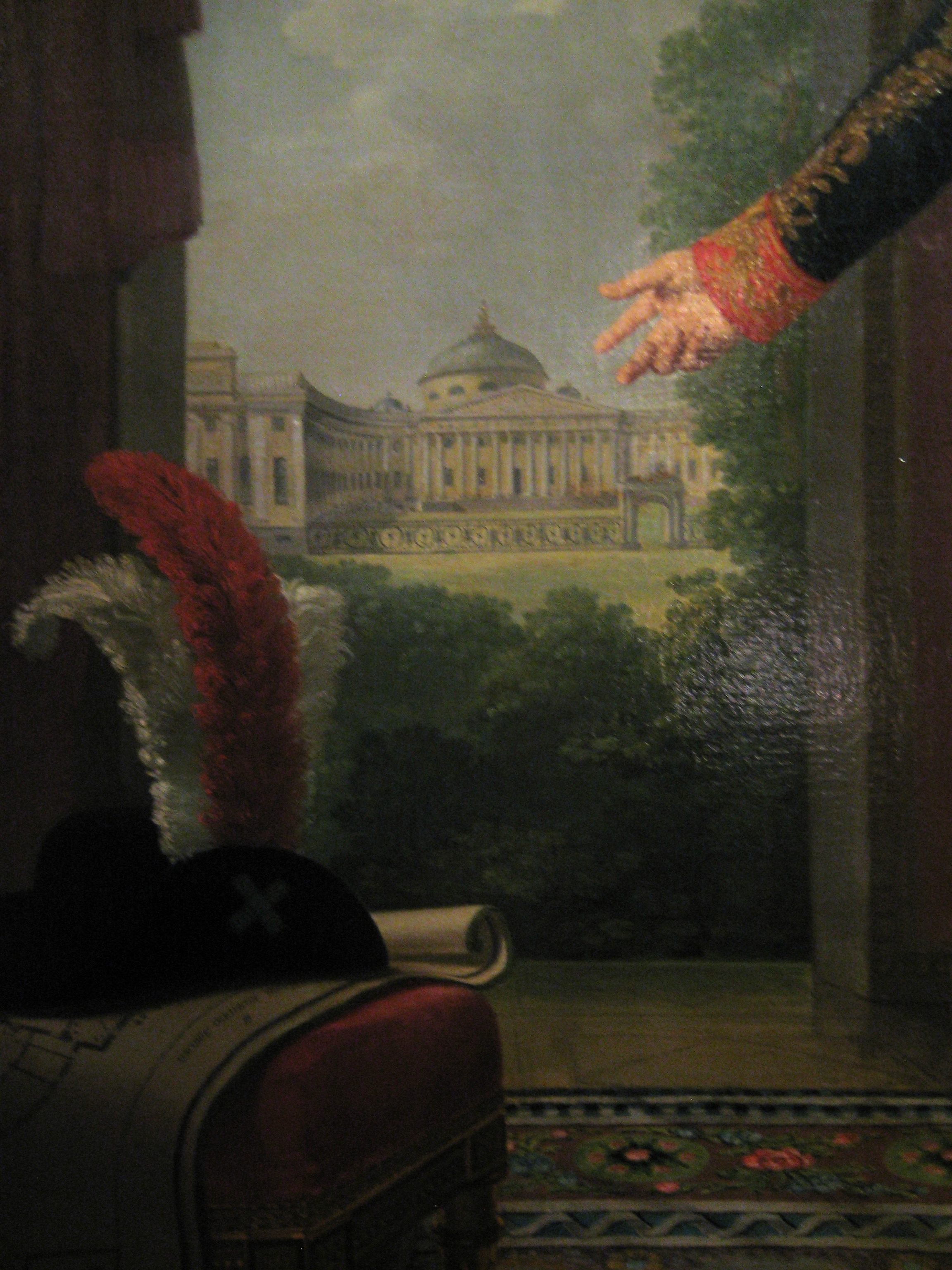 Выставка "Национальная портретная галерея", ГИМ, 2012